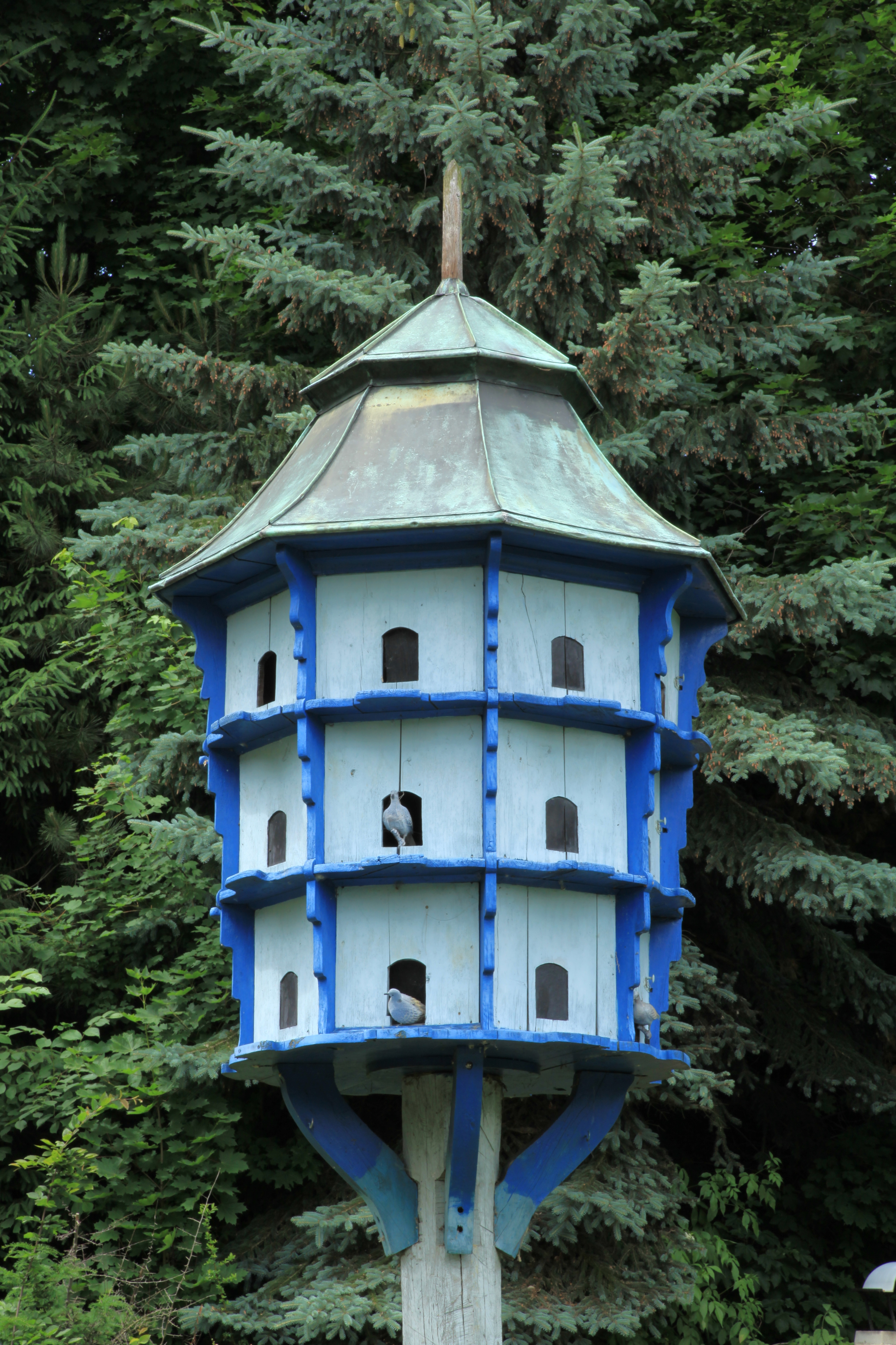 Gemauerte Mühle am Löbauer Wasser in der Georgewitzer Skala in Löbau